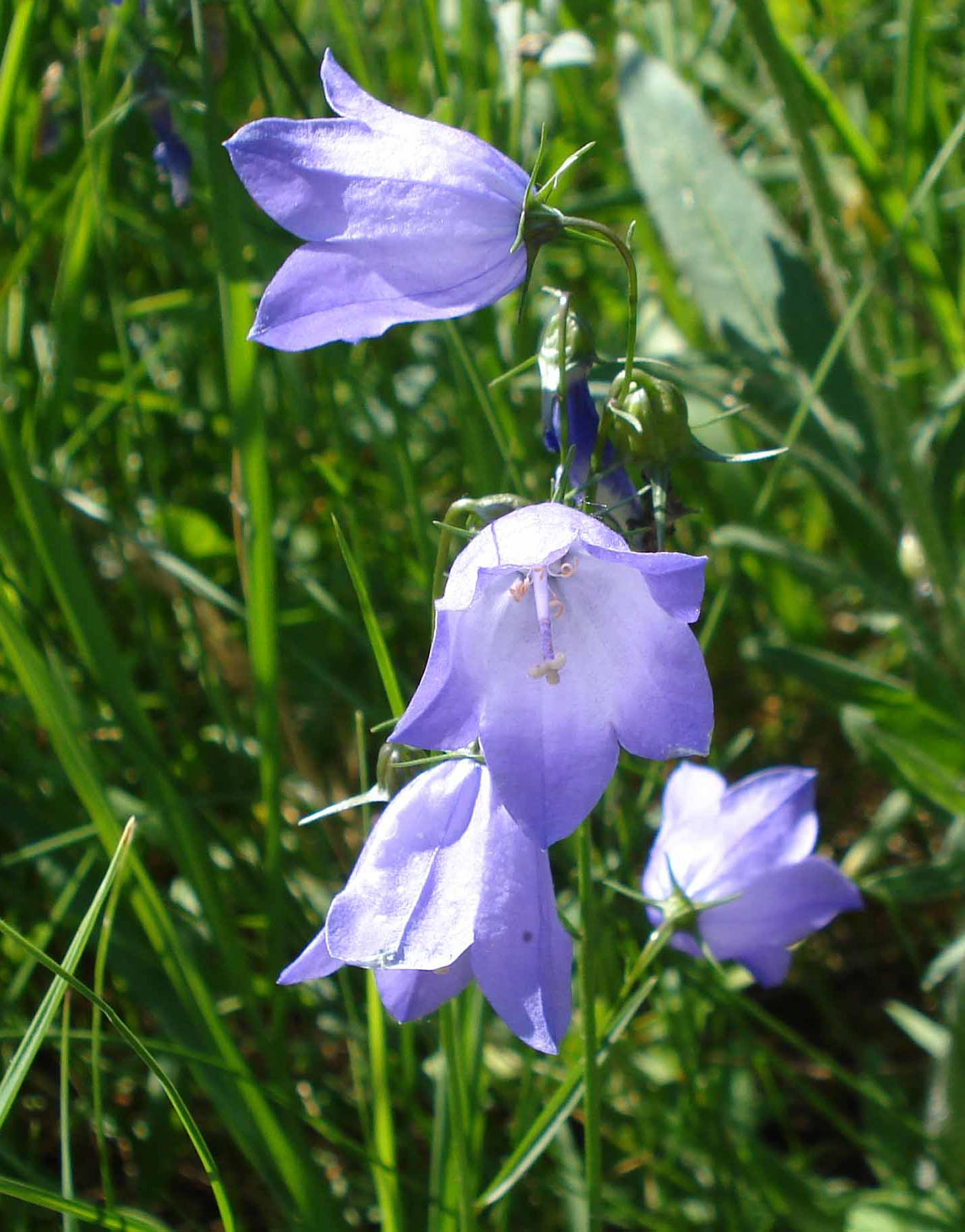 Campanula rotundifolia (Unterfranken, Germany)